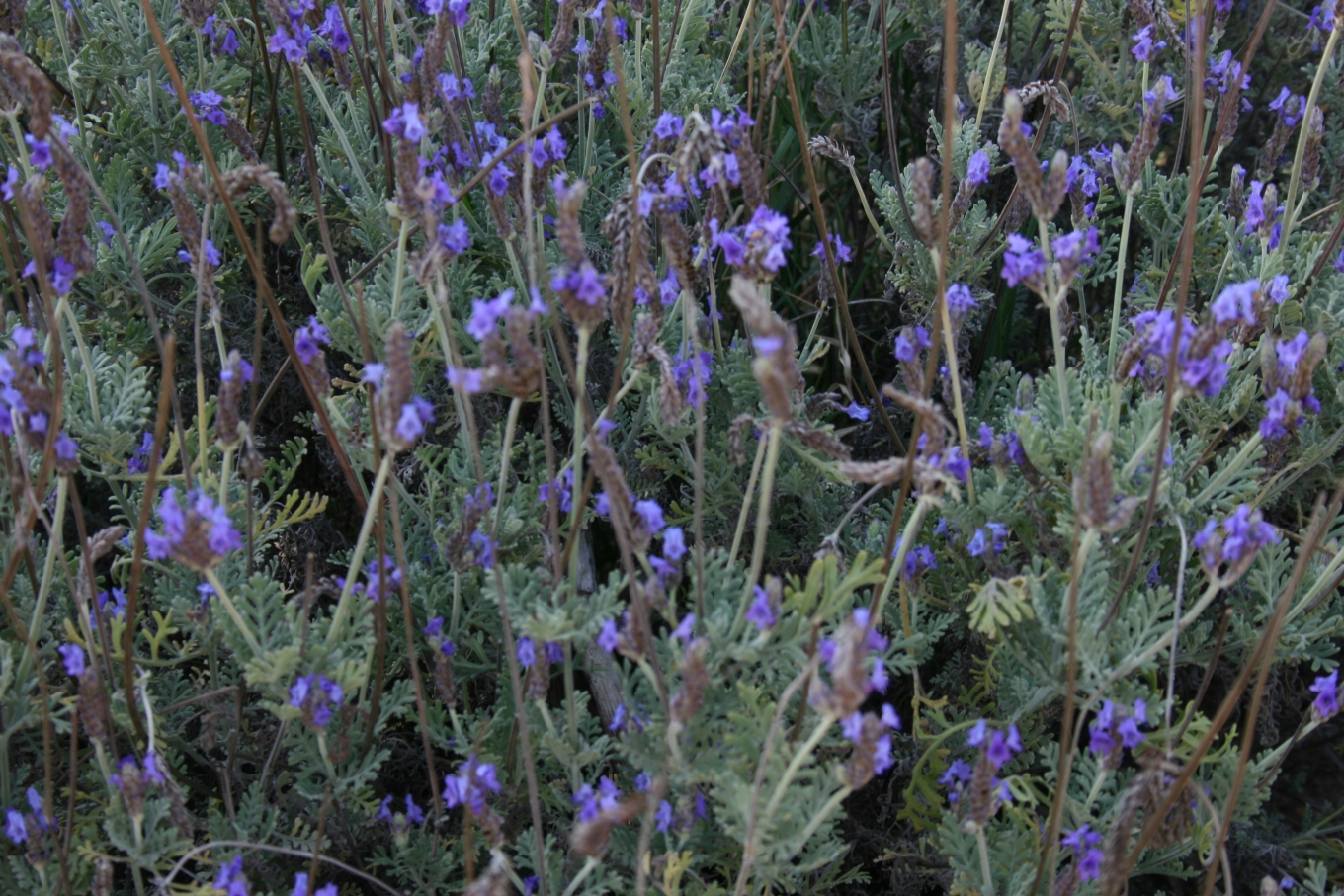 Lavandula multifida: Habit.